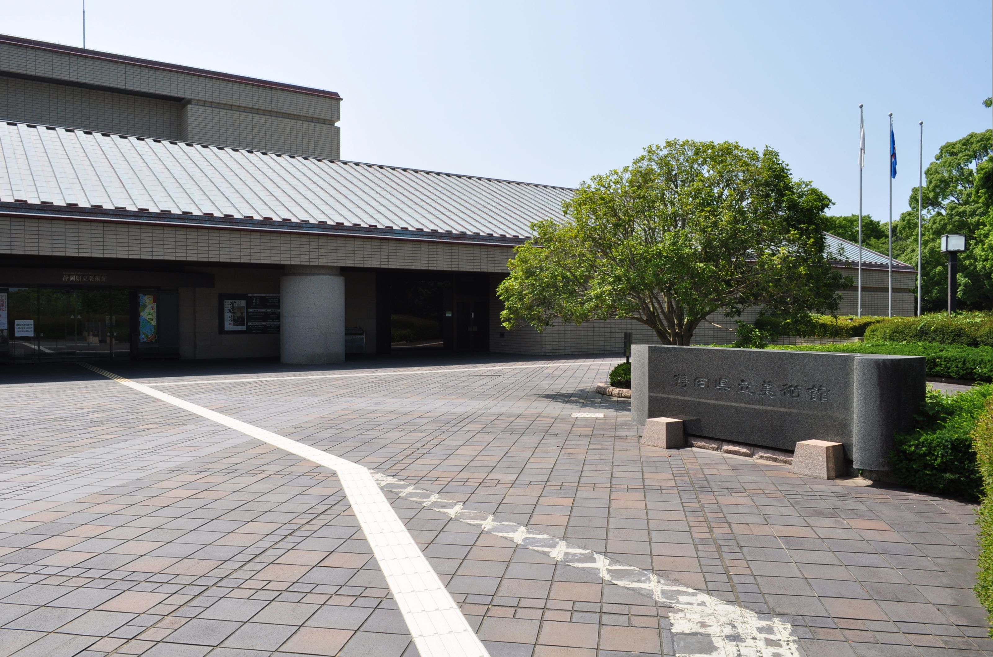 2014年6月19日撮影